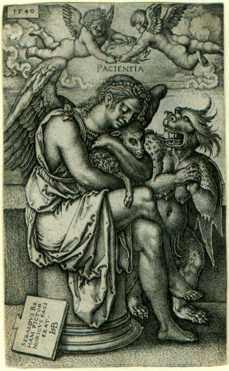 Beham, (Hans) Sebald (1500-1550): Pacientia - Die Geduld (Patience). Kupferstich/engraving. 10,6 x 7 cm. 1540. B. 138, Pauli 141, Hollstein 141 V (von VI).Vor der zusätzlichen Schraffur im rechten Ende der Säule. Ganz ausgezeichneter, kräftiger, nach oben jedoch etwas ungleichmäßiger Druck mit der vollen Darstellung. Minimal wellig und angestaubt, sonst jedoch tadellos.